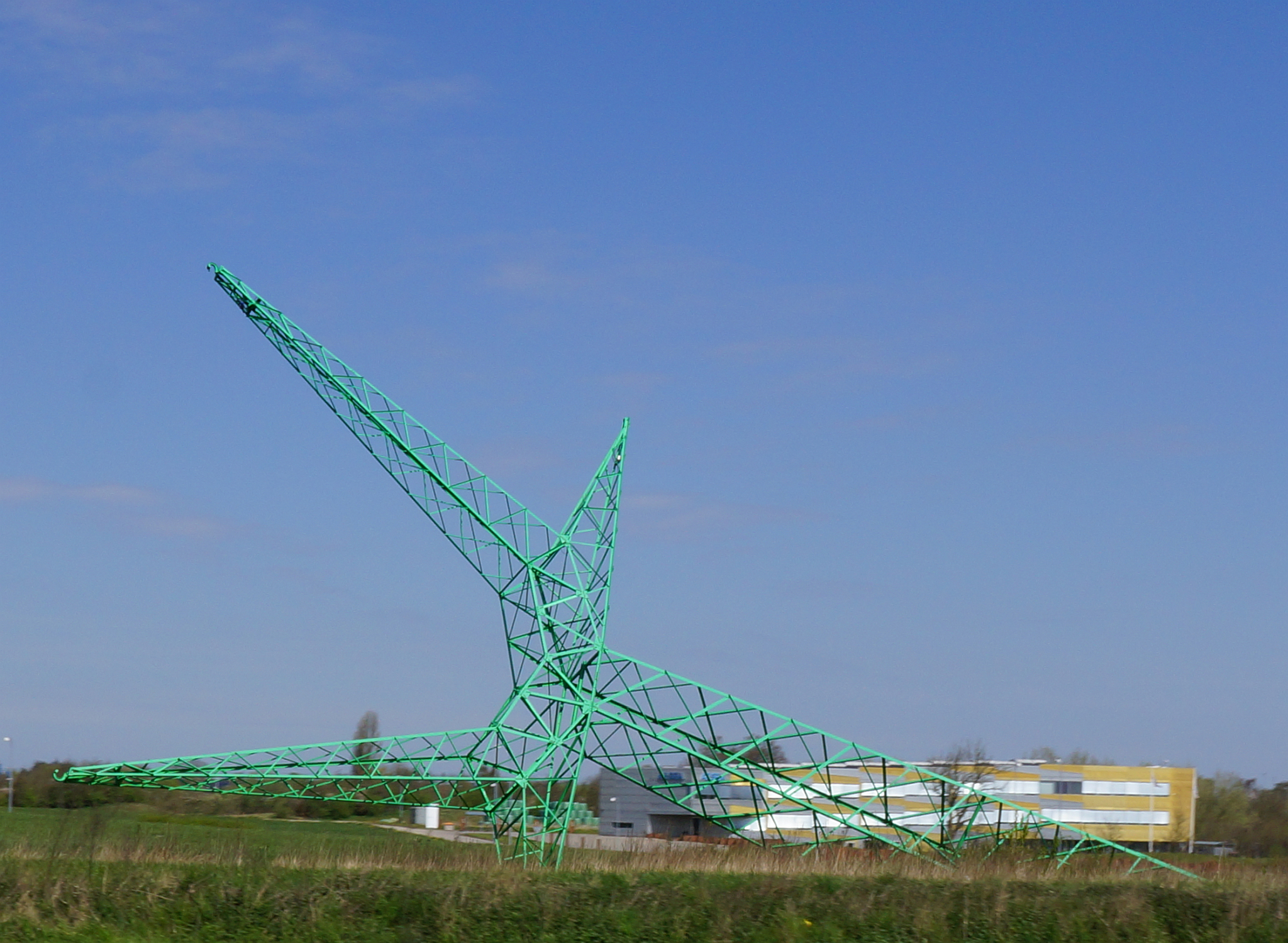 Hochspannungsmast nahe Biotop nahe Brovad Fredrericia Jütland Dänemark. Foto Wolfgang Pehlemann DSC03365Dansk: Grøn højspændingsmast nord for motorvejen umiddelbart øst for Motorvejskryds Fredericia